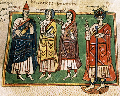 Rei Ariamiro ou Teodomiro cos bispos Lucrecio, André e Martiño.